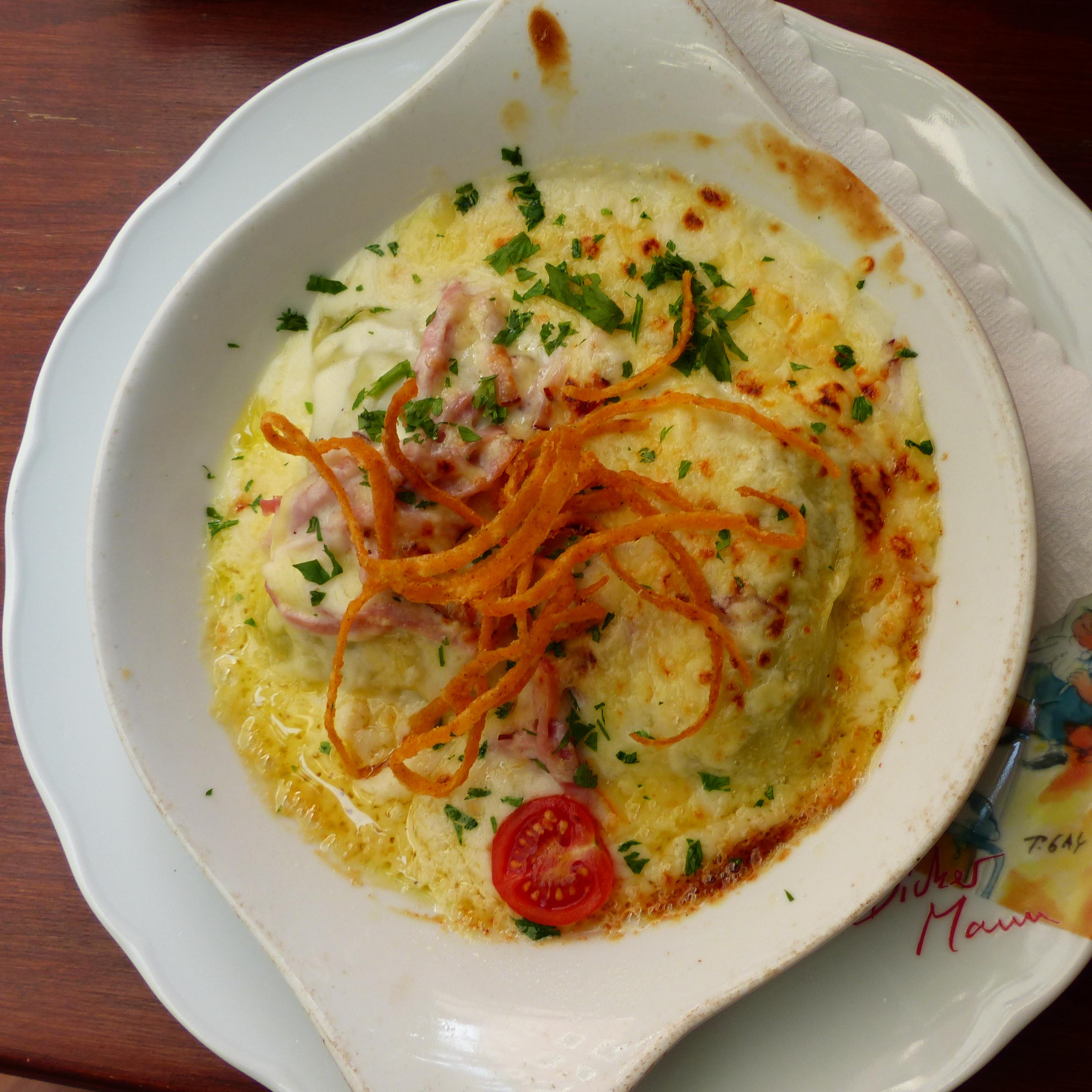 Allgäuer Maultaschen mit Schinken und Käse überbacken, Restaurant zum Blauen Krebs in Regensburg